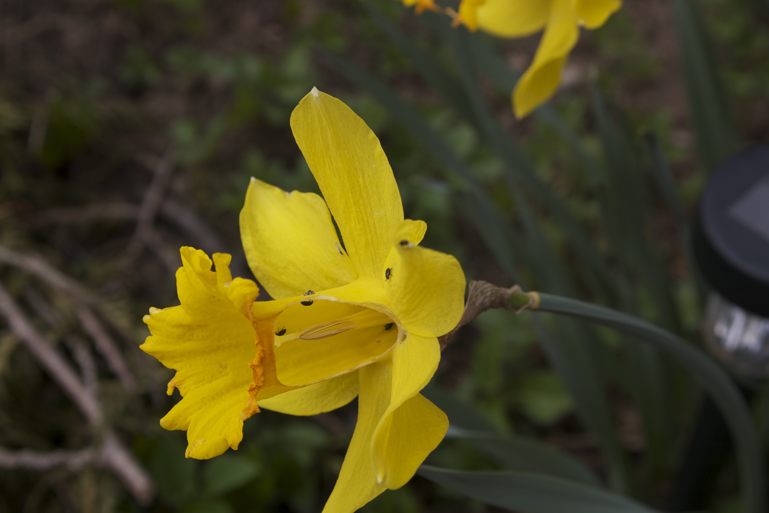 Von Käfern angefreſſene gelbe Blüte einer Trompetennarcisſe.